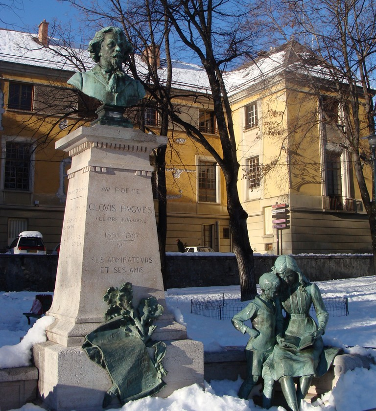 Embrun (Hautes-Alpes) : monument à Clovis Hugues, dans le jardin de l'archevêché. Au poète Clovis Hugues. Felibre Majoral. 1851-1907. Ses admirateurs et ses amis.